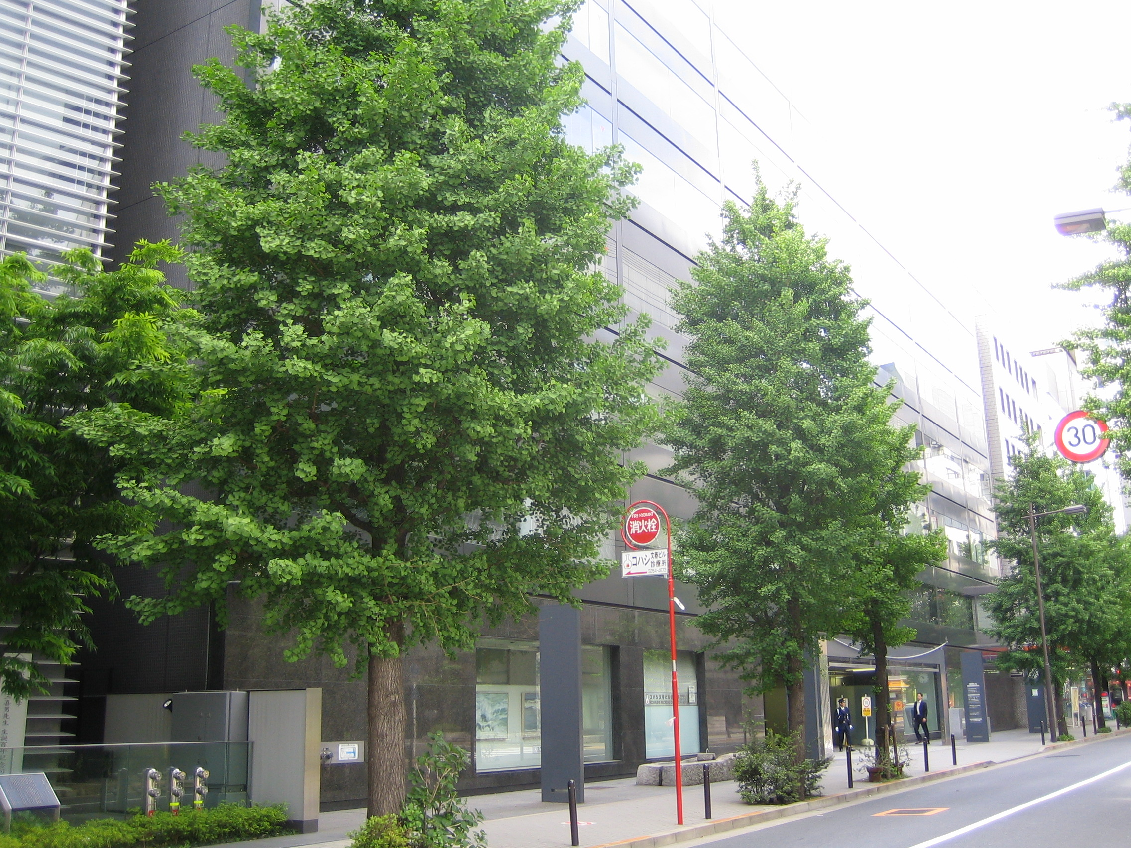 Bungei Shunju (文藝春秋 Bungei Shunjū), the Japanese publisher, in Chiyoda, Tokyo, Japan